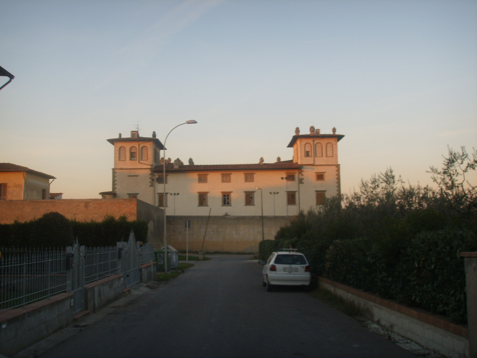 Montelupo_-_Villa_dell'Ambrogiana Medici's Villa in Montelupo